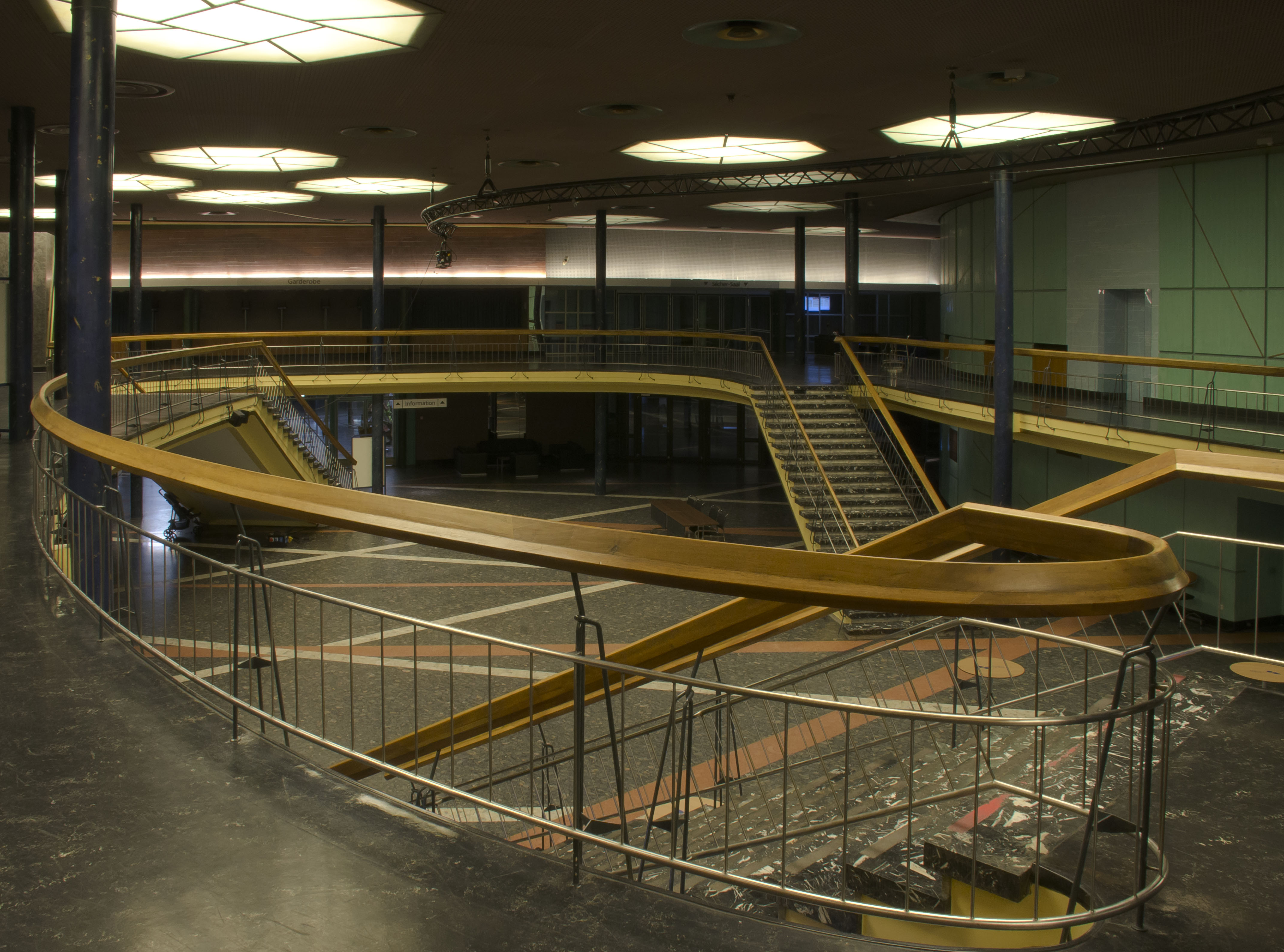 Liederhalle Stuttgart, Foyer des Beethovensaals